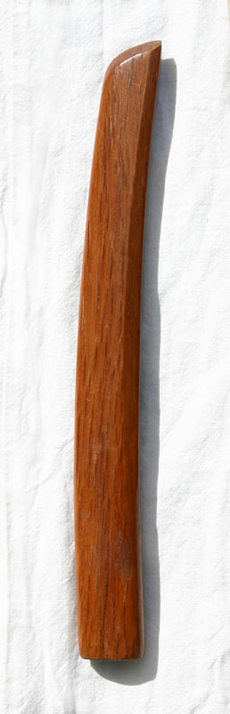 Tanto aus japanischer Roteiche